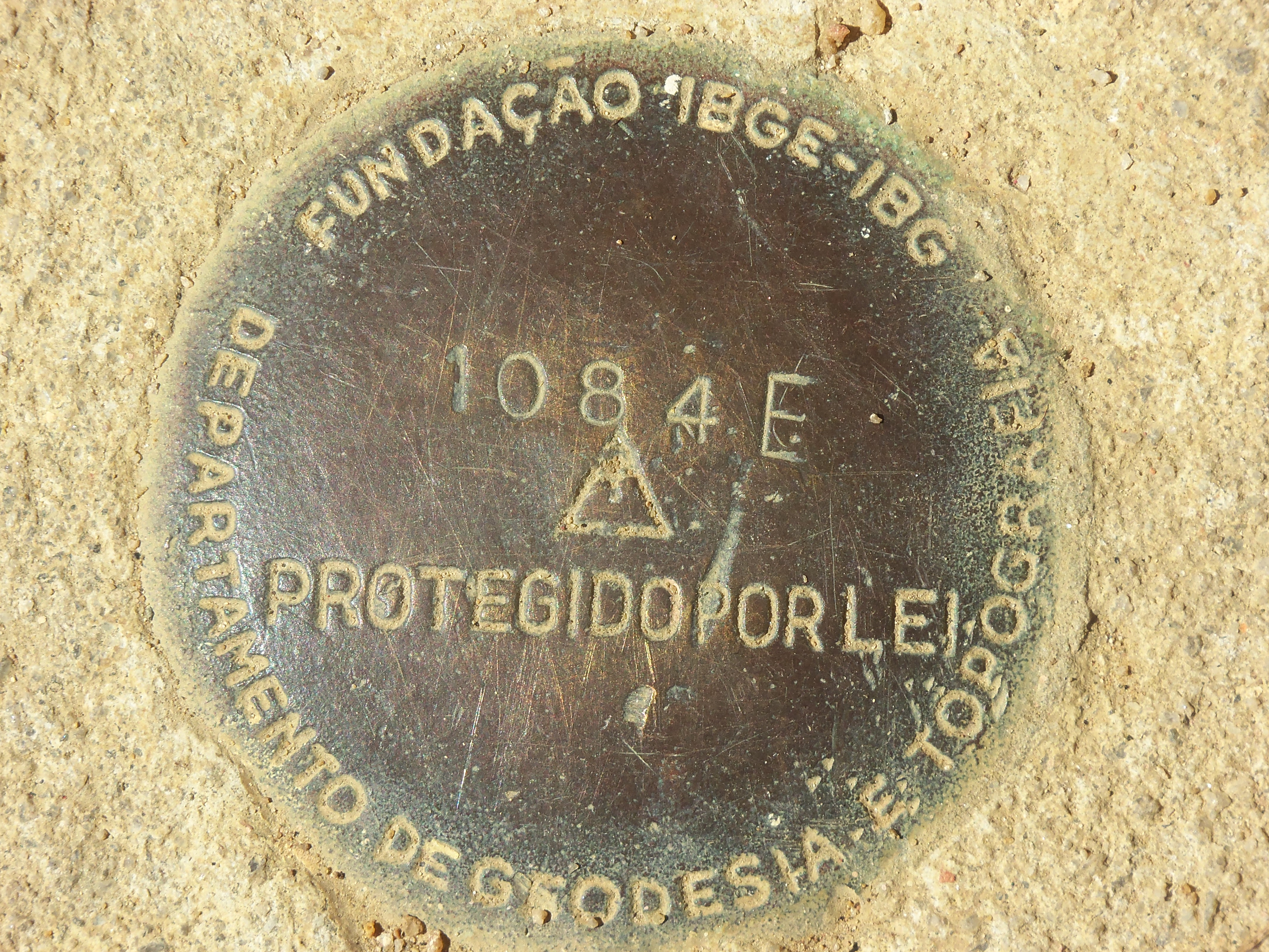 Marco geodésico do IBGE na igreja de Santa Rosa, em Aracruz